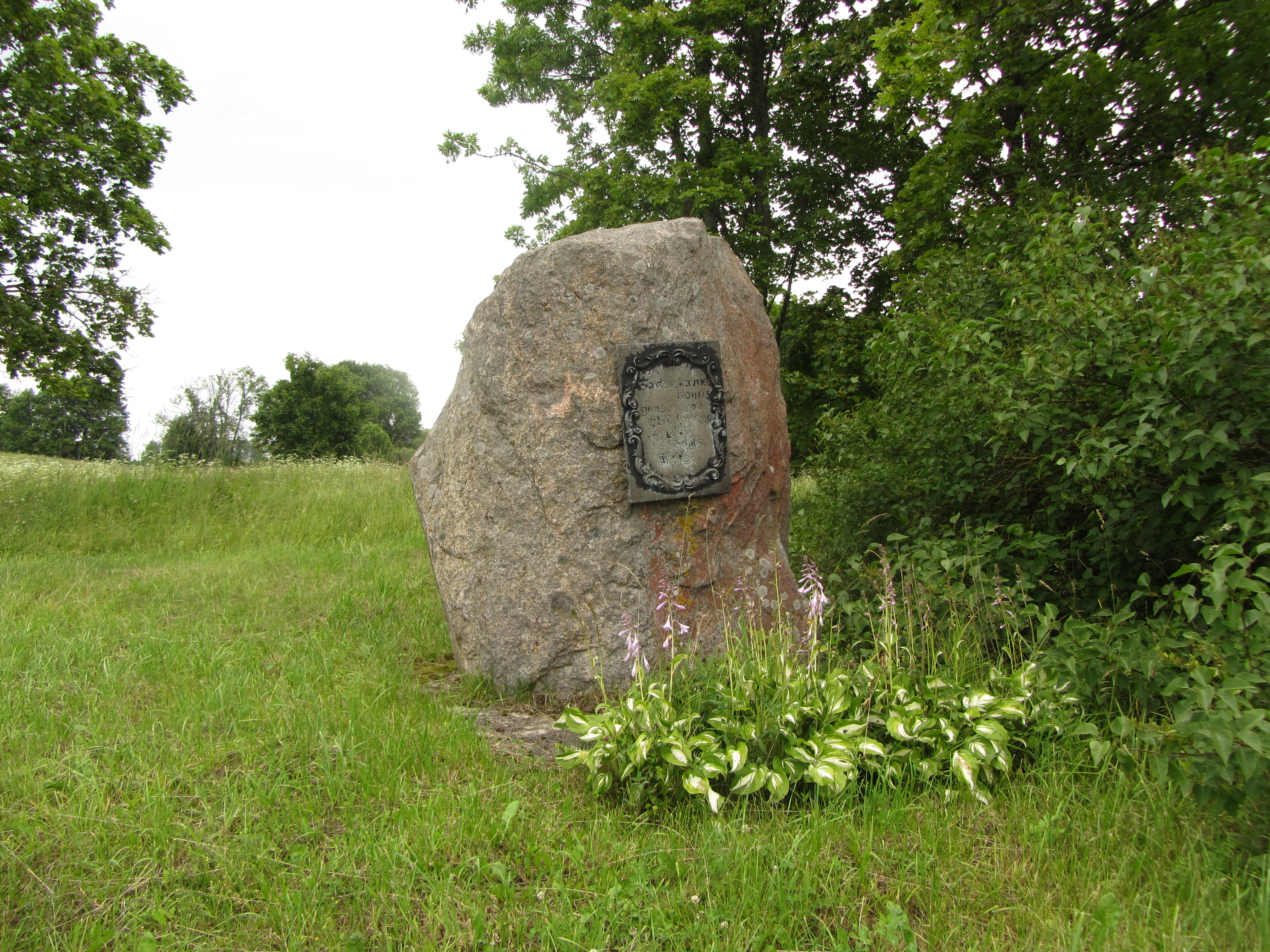 Tauragnų sen., Lithuania